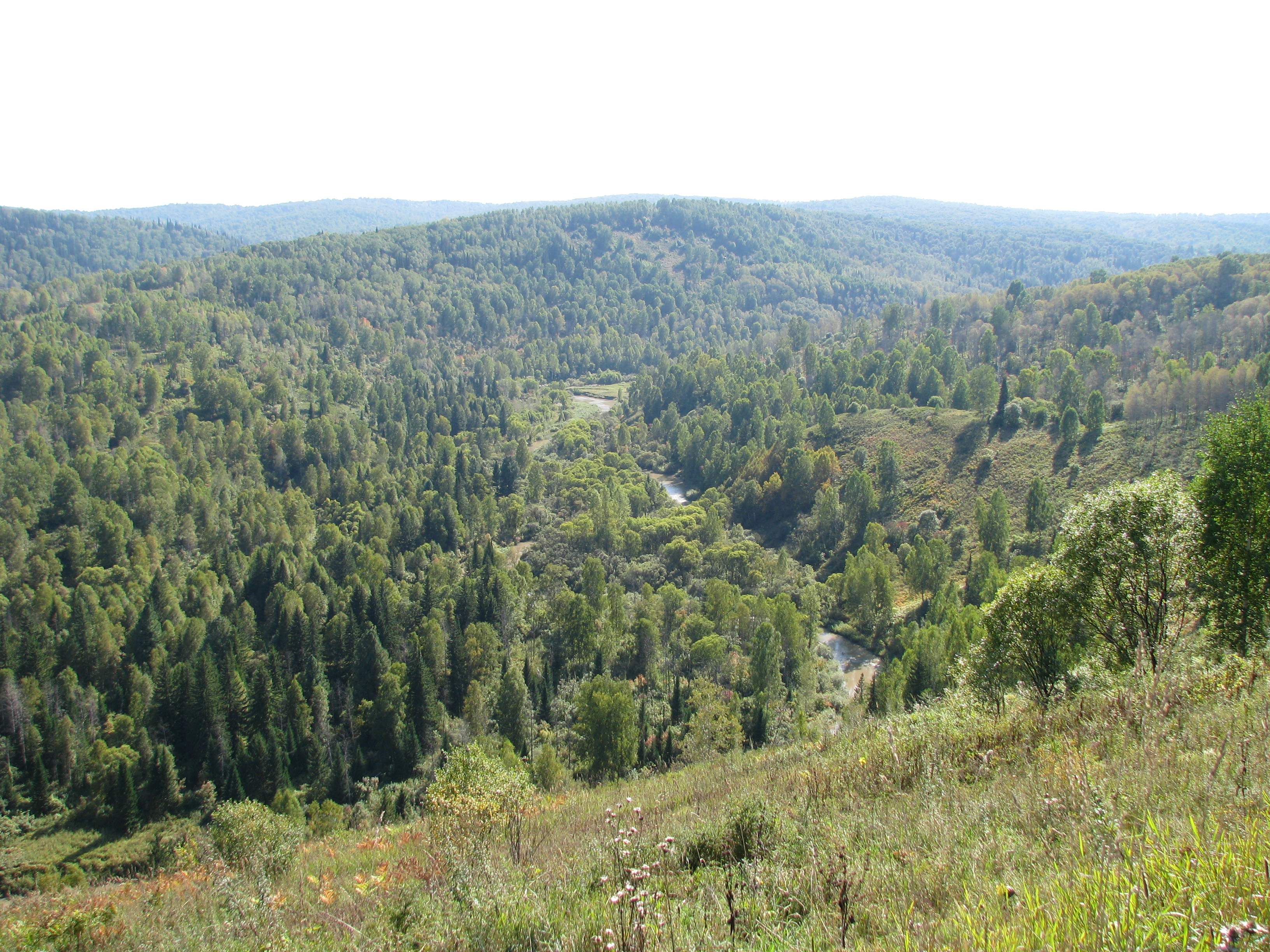 Долина реки Большой Теш недалеко от ее впадения в Кондому